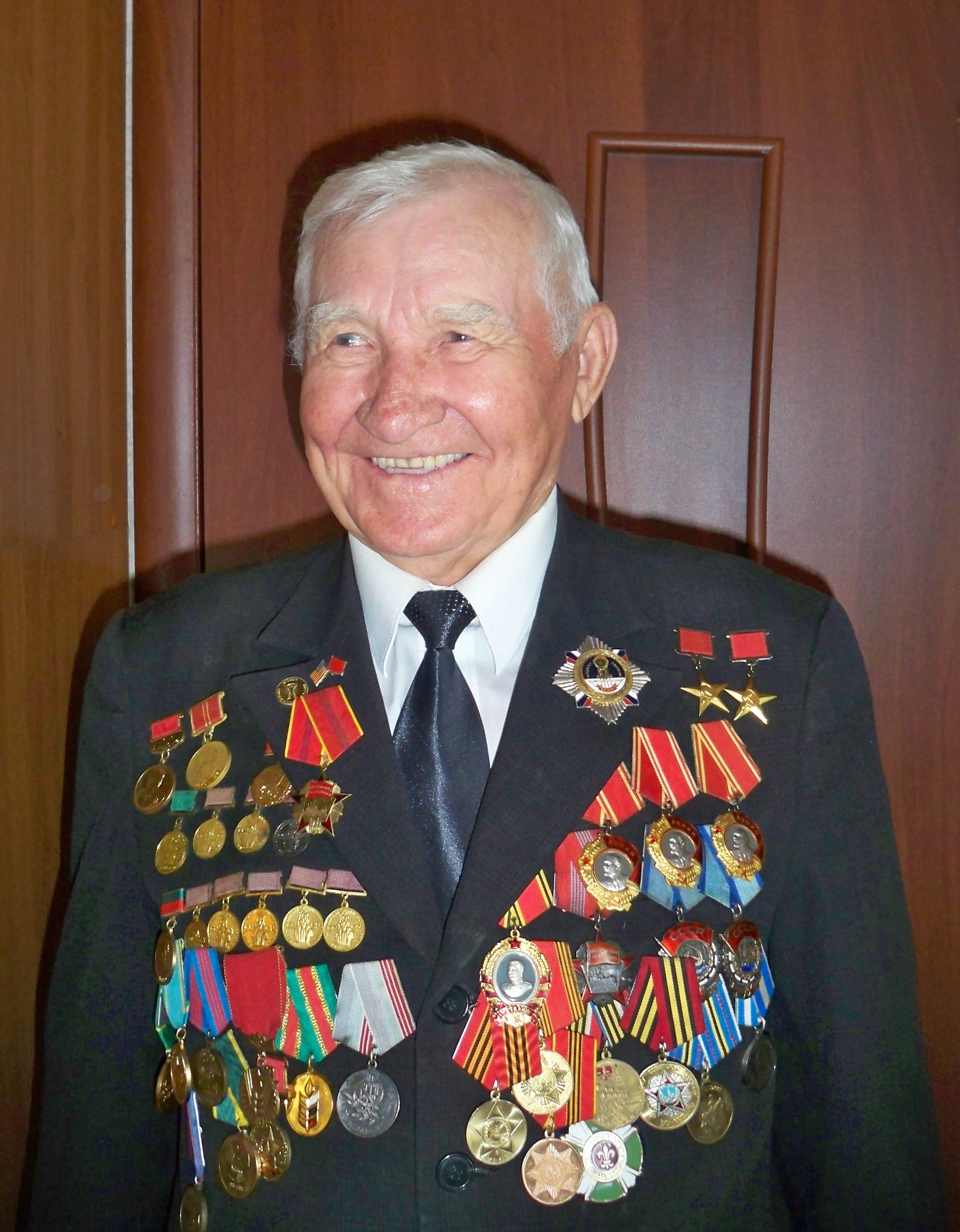 Vasily Makarovich Cherdintsev, twice Hero of Socialist Labour